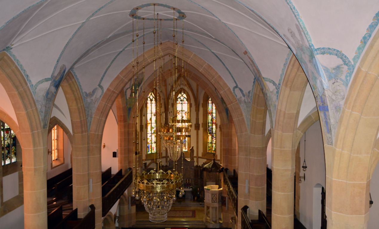 Blick auf das Gewölbe und die Lüster in der Heilig-Kreuz-Kirche in Röthenbach an der Pegnitz (Foto basiert auf einem von Werner Holzinger, Röthenbach, zur Verfügung gestellten Original)